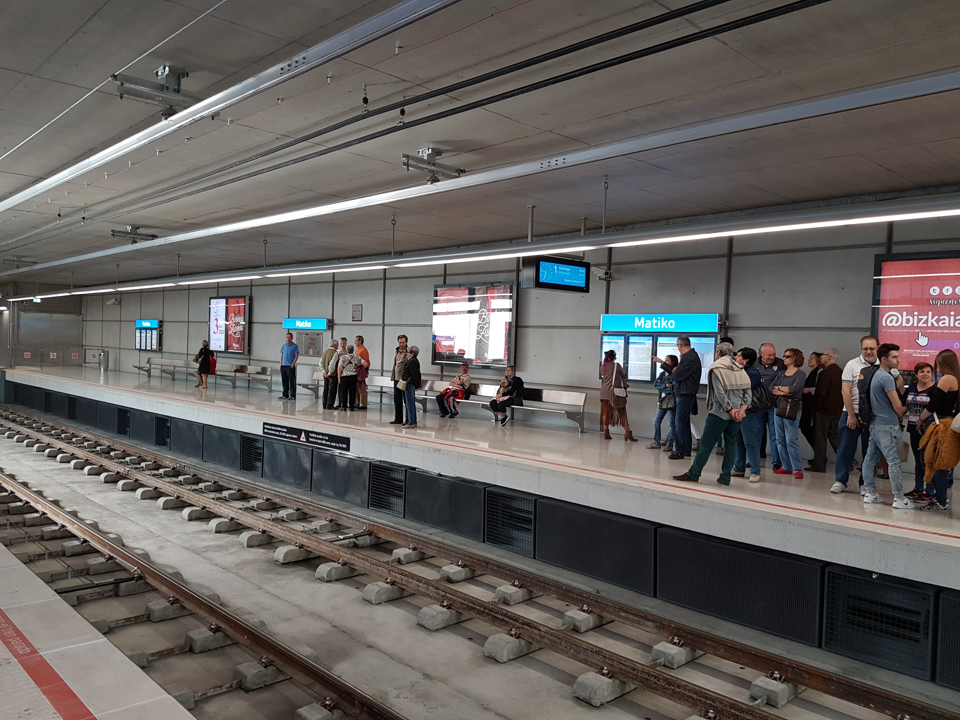 Estación de Matiko.